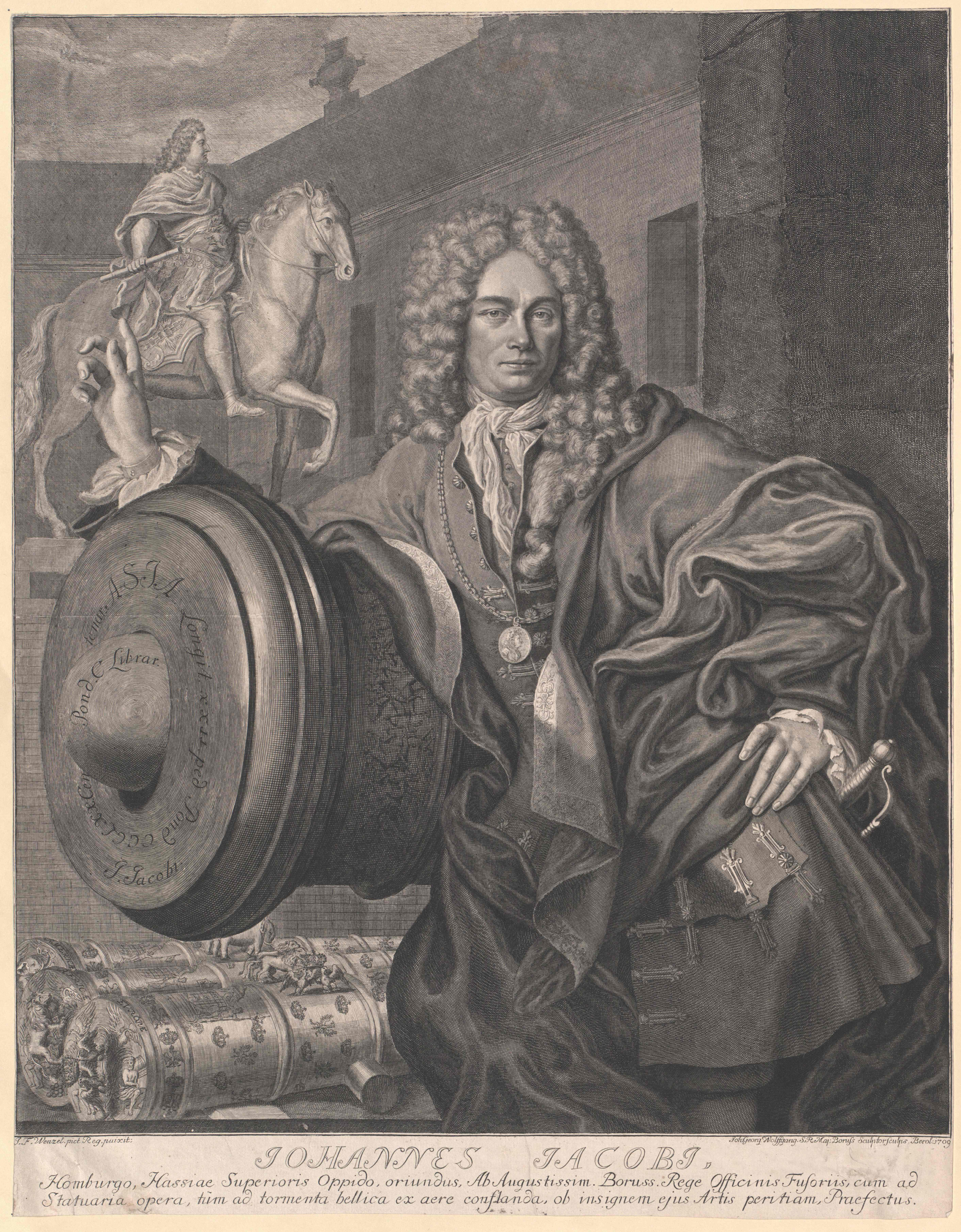 Johann Jacobi, Erzgießer, mit der Kanone „Asia“, im Hintergrund die Reiterstatue des Großen Kurfürsten